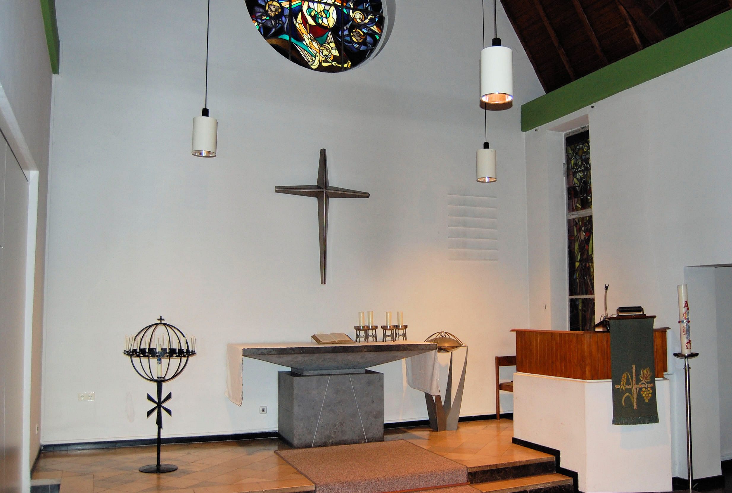 Altarbereich der Friedenskirche in Hürth-Efferen